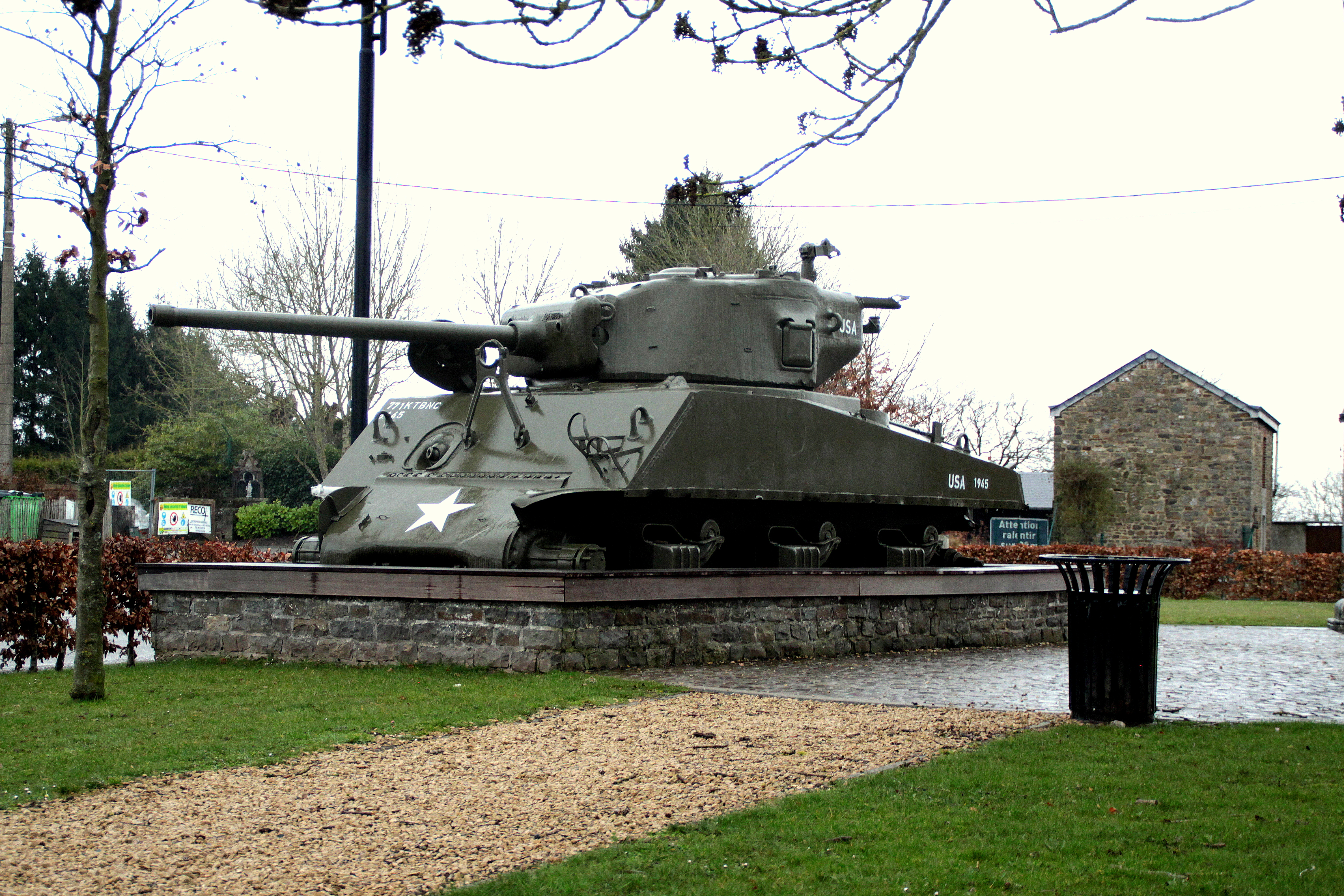 Sherman Tanks zu Beffe Wikidata has entry Q51209584 with data related to this item.